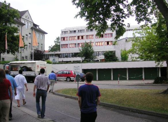 Panorama des Kolleg St. Josef Ehingen